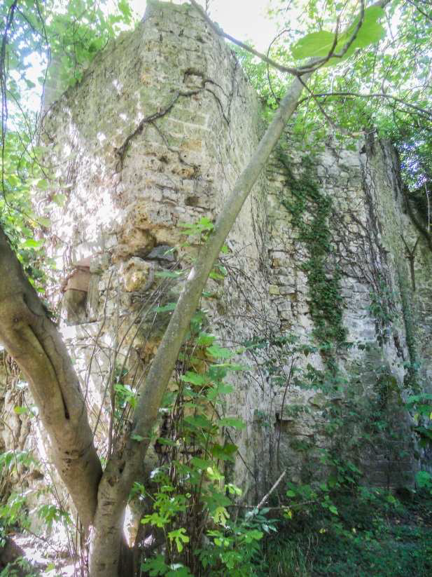 Ruines du moulin de Gasconnet